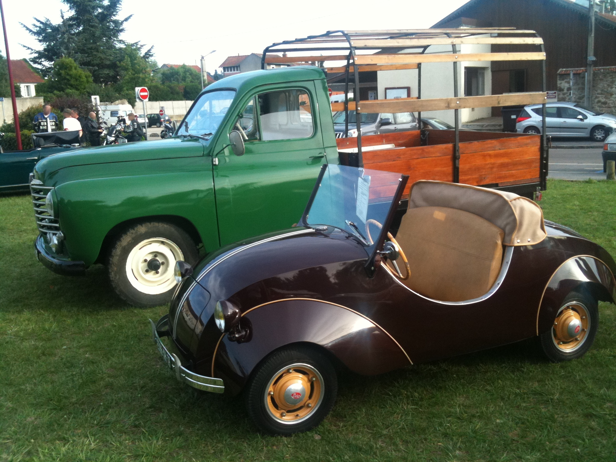 Rovin Type 2 produite en 1949 à Saint-Denis dans l'usine Delaunay-Belleville photographiée à Trilport (Seine-et-Marne, France). A l'arrière plan, un fourgon Renault.